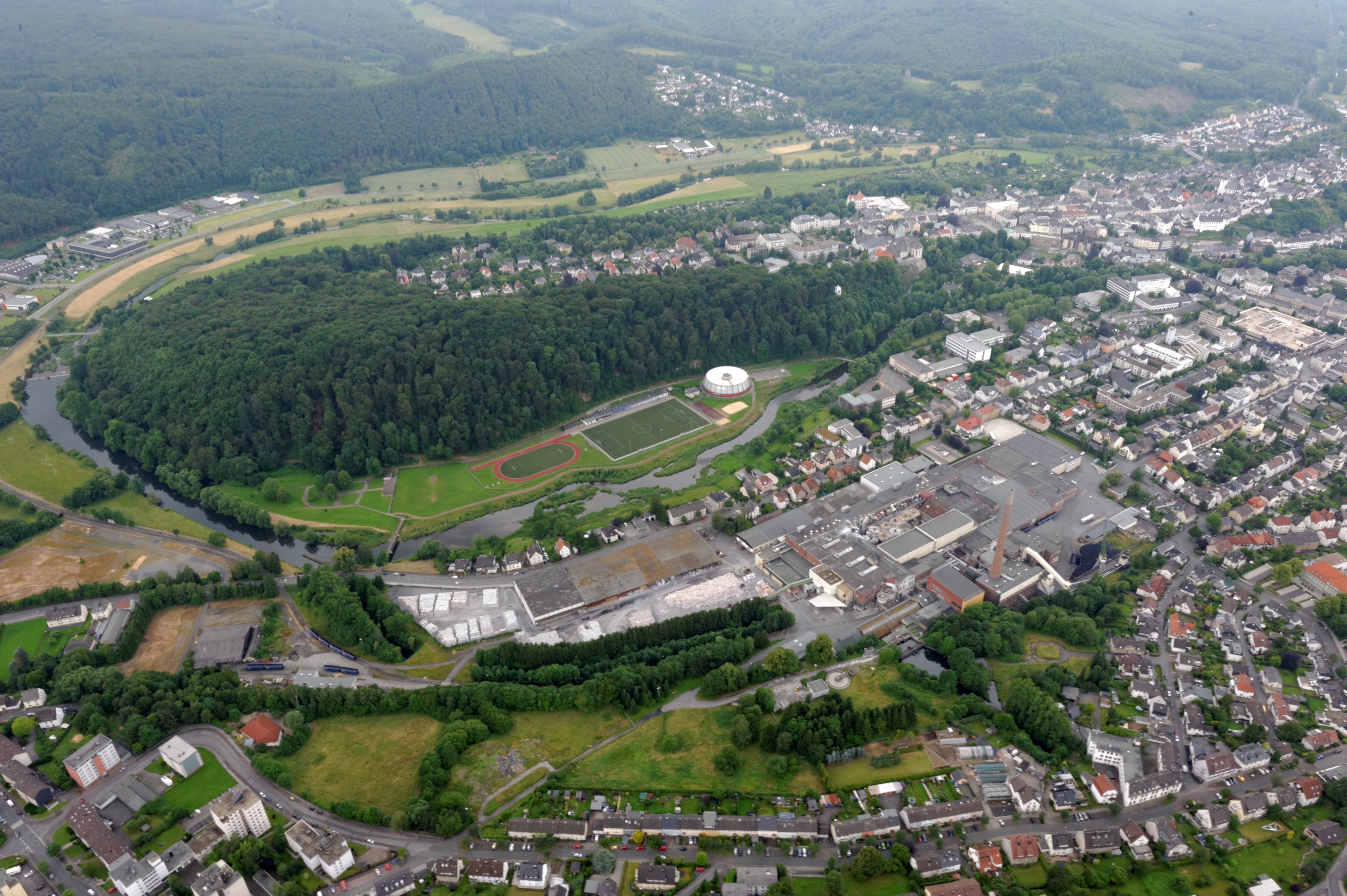 Arnsberg: Ruhrbogen um das Eichholz (Naturschutzgebiet „Eichholz“). Vorne Betriebsgelände Reno de Medici, dahinter Hellefelder Straße, Ruhr, Sportanlagen und Schulen unterhalb des Eichholze, Wohngebiet Eichholz-/Laurentiusstraße, Klassizismusviertel, Altes Feld mit Berufsbildungszentrum, im Hintergrund Seltersberg (Fotoflug Sauerland Nord)